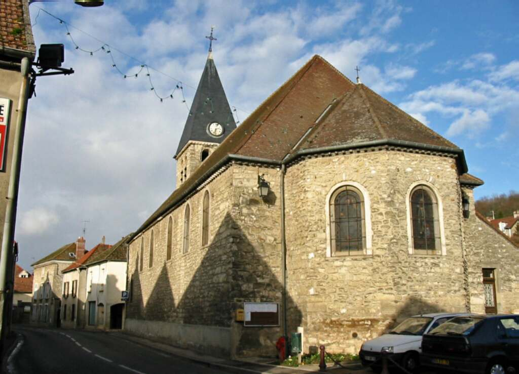 Église de Nézel (Yvelines) Photo JH Mora ; janvier 2005